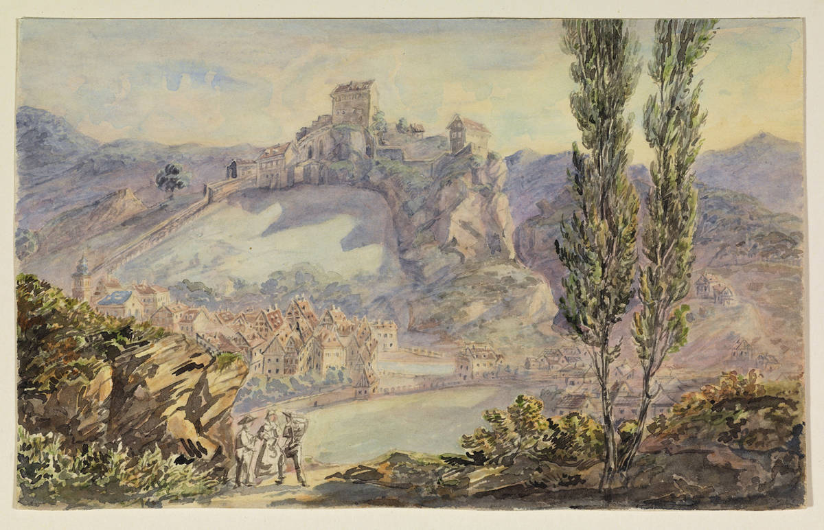 Burg und Stadt Pottenstein. Aquarell, um 1850 (Staatsbibliothek Bamberg, I R 11-v)